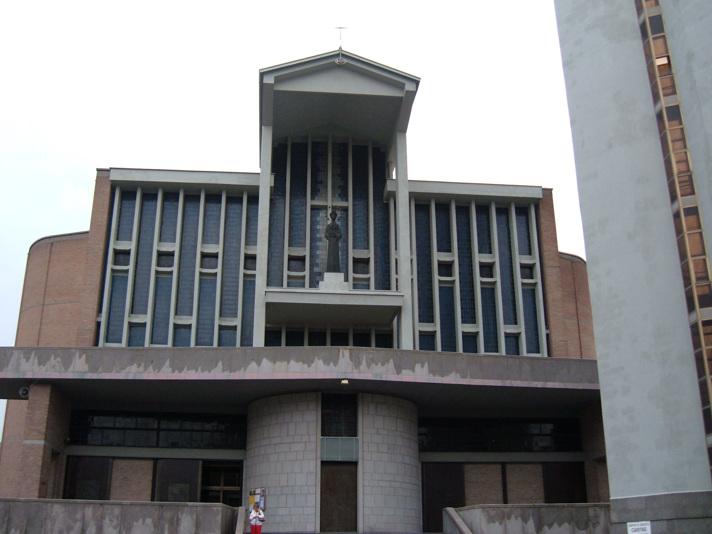 Chiesa di Nostra Signora de La Salette, a Roma, nel quartiere Gianicolense.